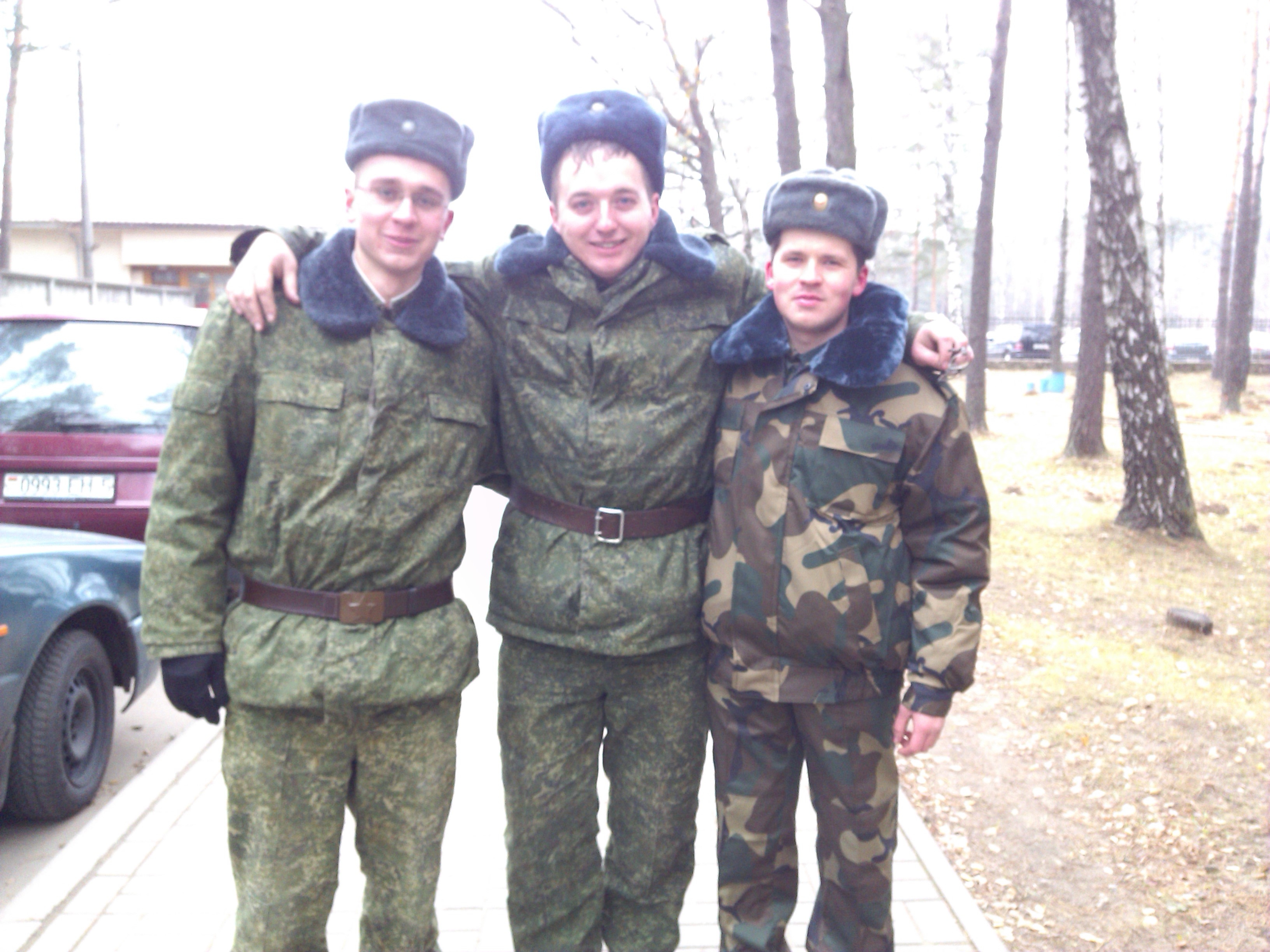 Беларускія вайскоўцы ў зімовай форме адзежы